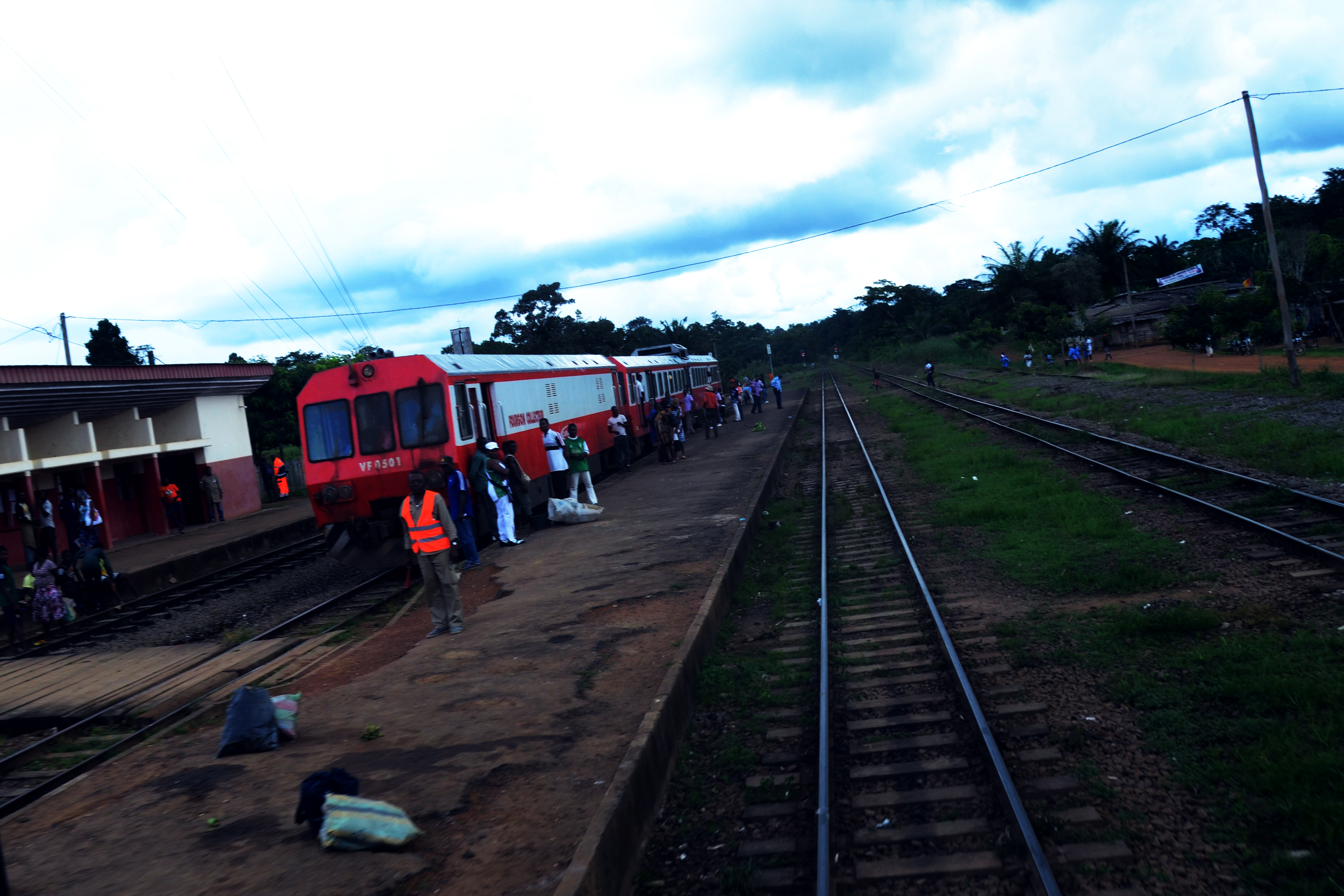 Un train voyageur en gare au Cameroun This is an image with the theme "Africa on the Move or Transport" from: Cameroon